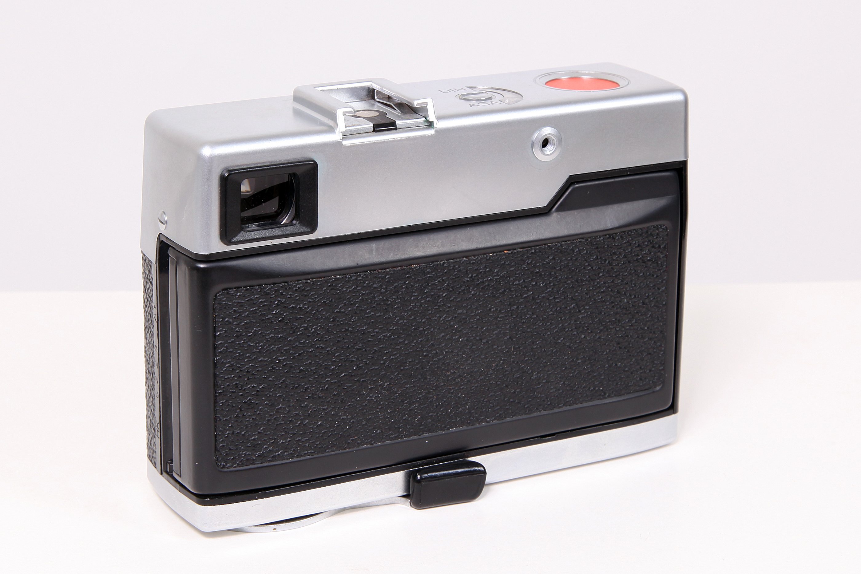 Fotoapparat Agfa Optima 200, Rückseite